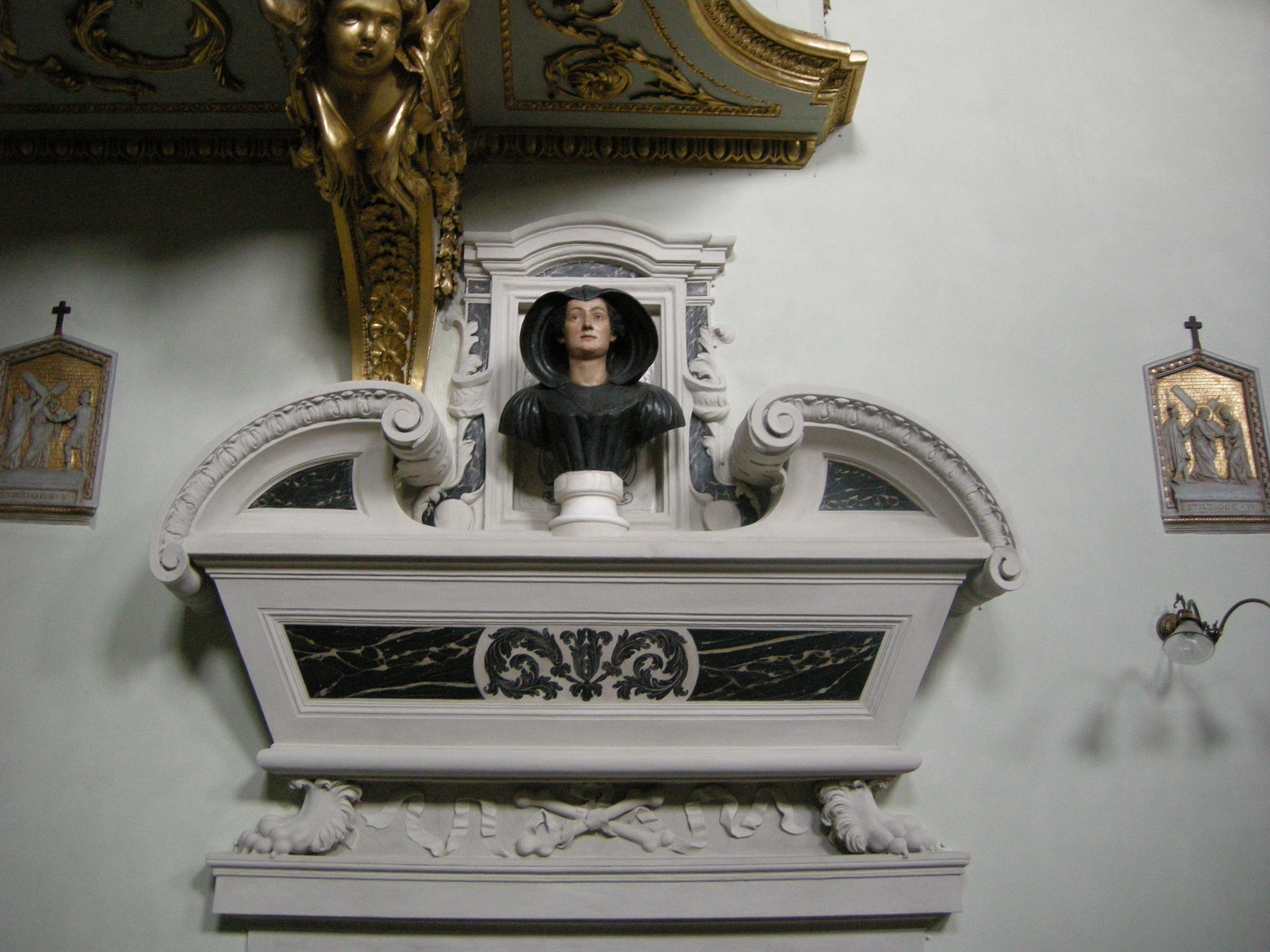 Chiesa delle montalve, interno, sepolcro di eleonora ramirez de montalvo, stucco di Giacomo Antonio Corbellini (1689)